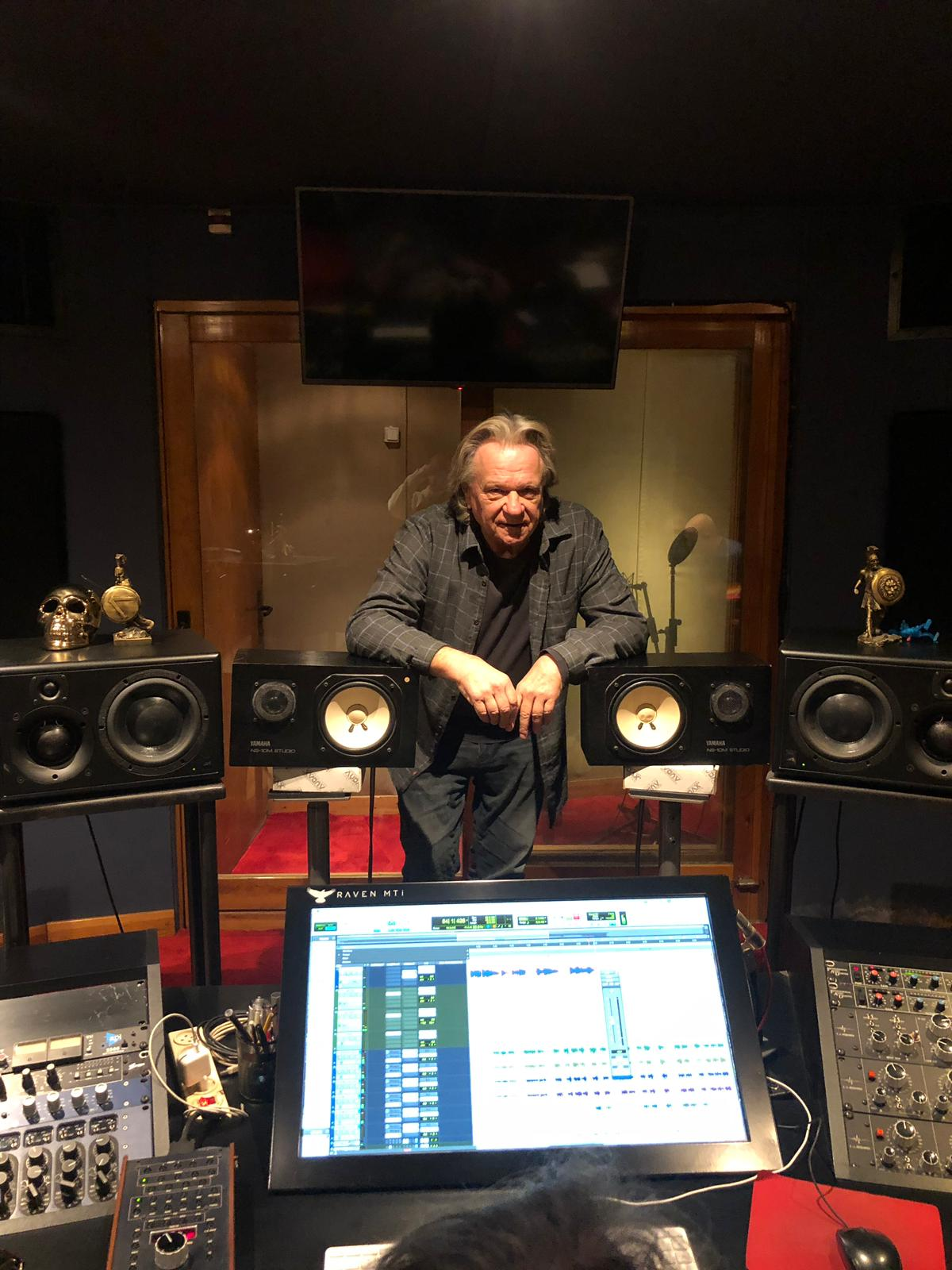 הנרי ברטר באולפן ברדו B